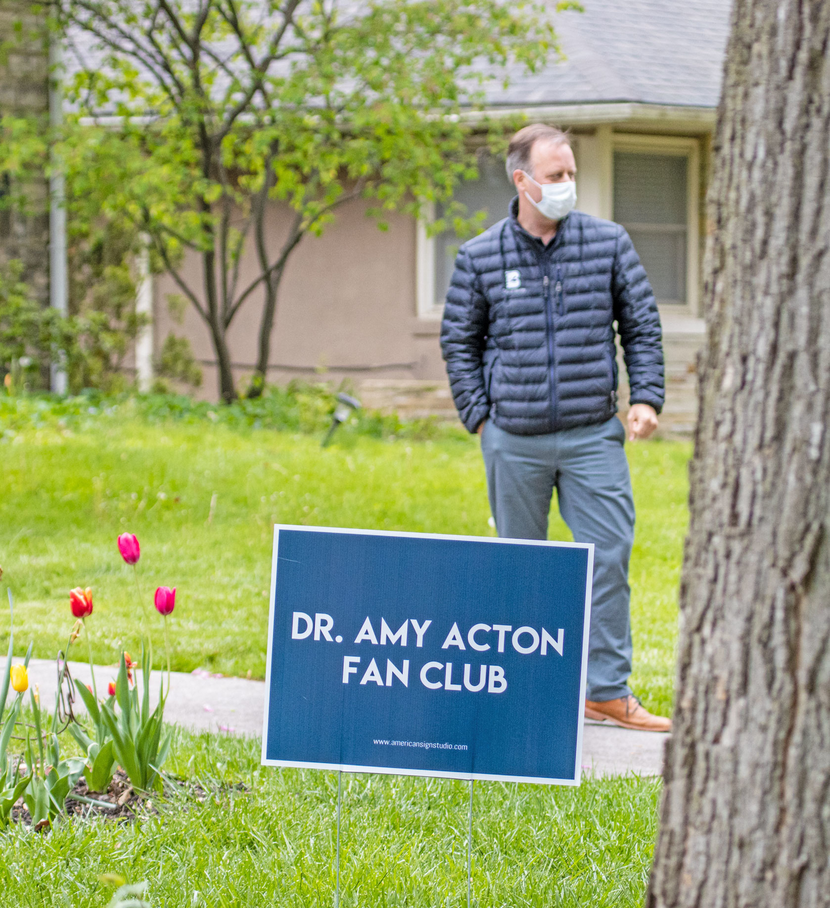 02aIMG_0789